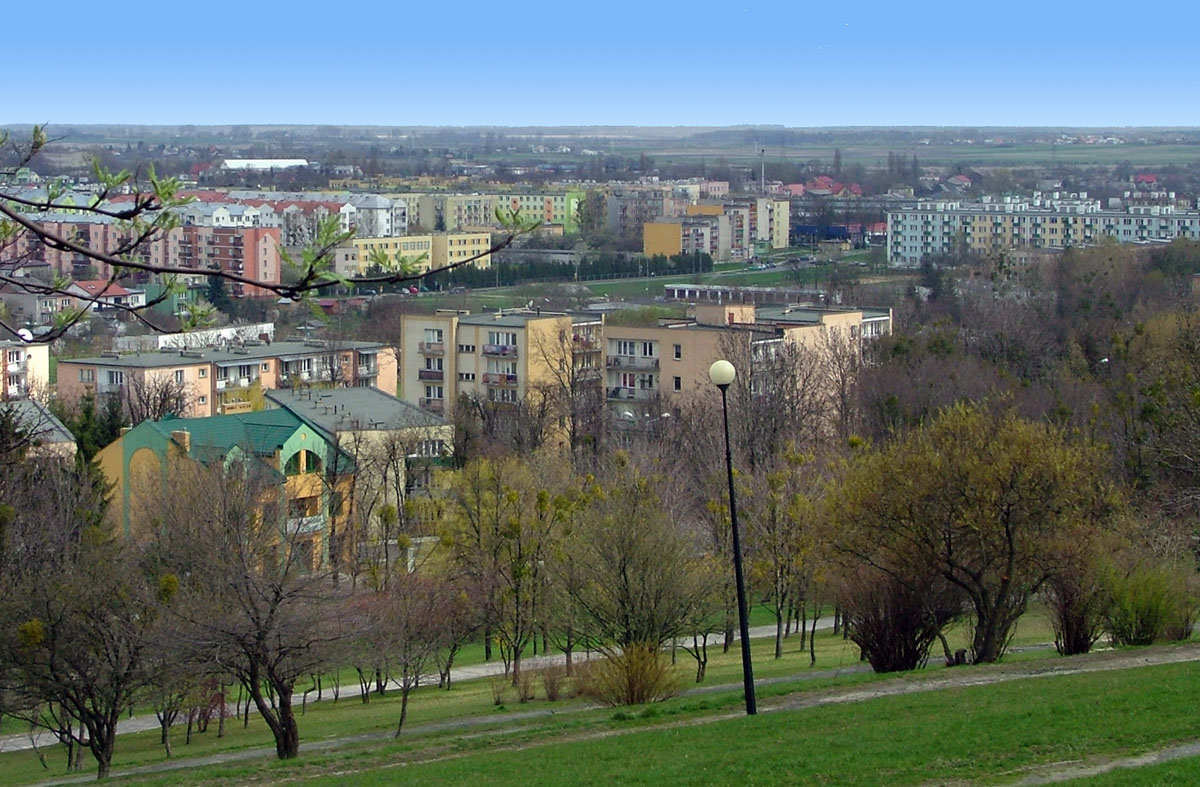 Chełm, widok z Górki Chełmskiej